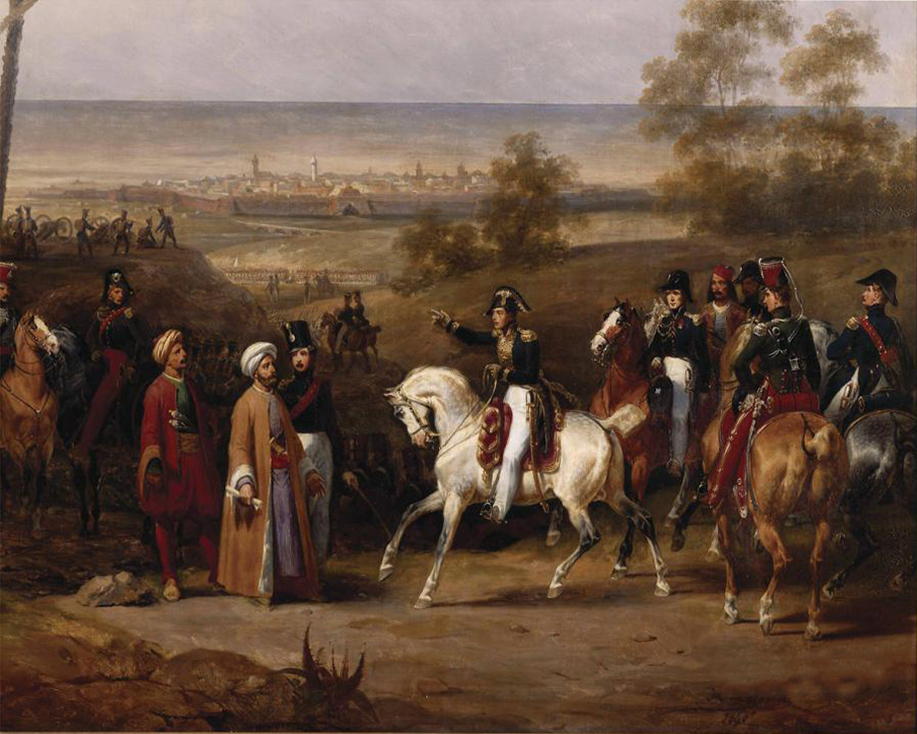 Episode de l'expédition de Morée en 1828, Prise de Coron par le général de brigade Sébastiani en présence du général grec Nikitaras, 9 octobre 1828 (detail)